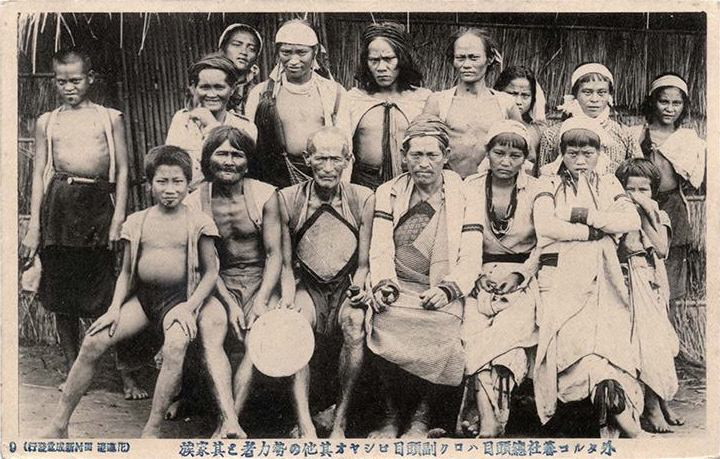 外太魯閣各部落總頭目與副總頭目及其家族。